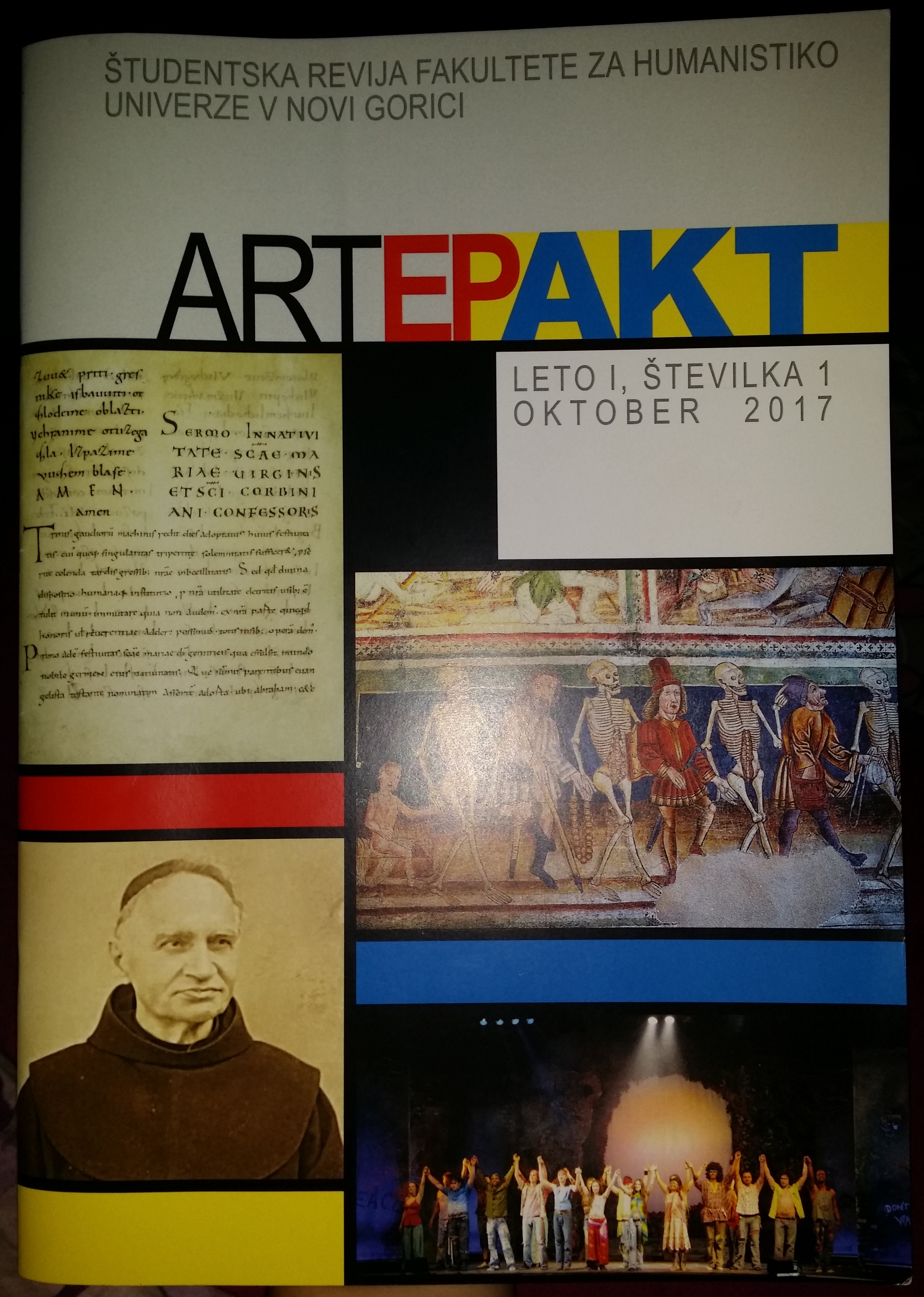 Artepakt